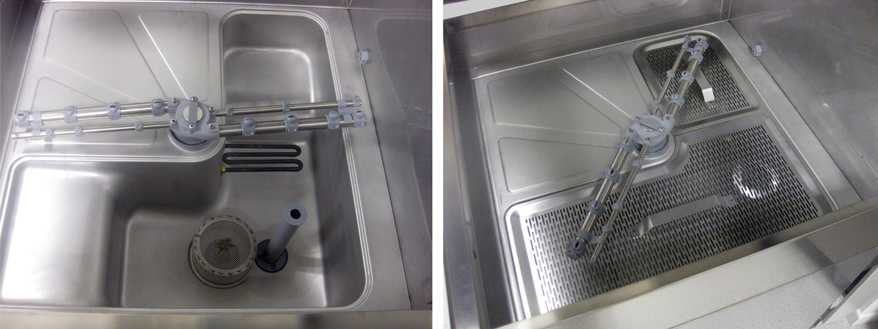 Wanne einer gastronomischen Haubenspülmaschine